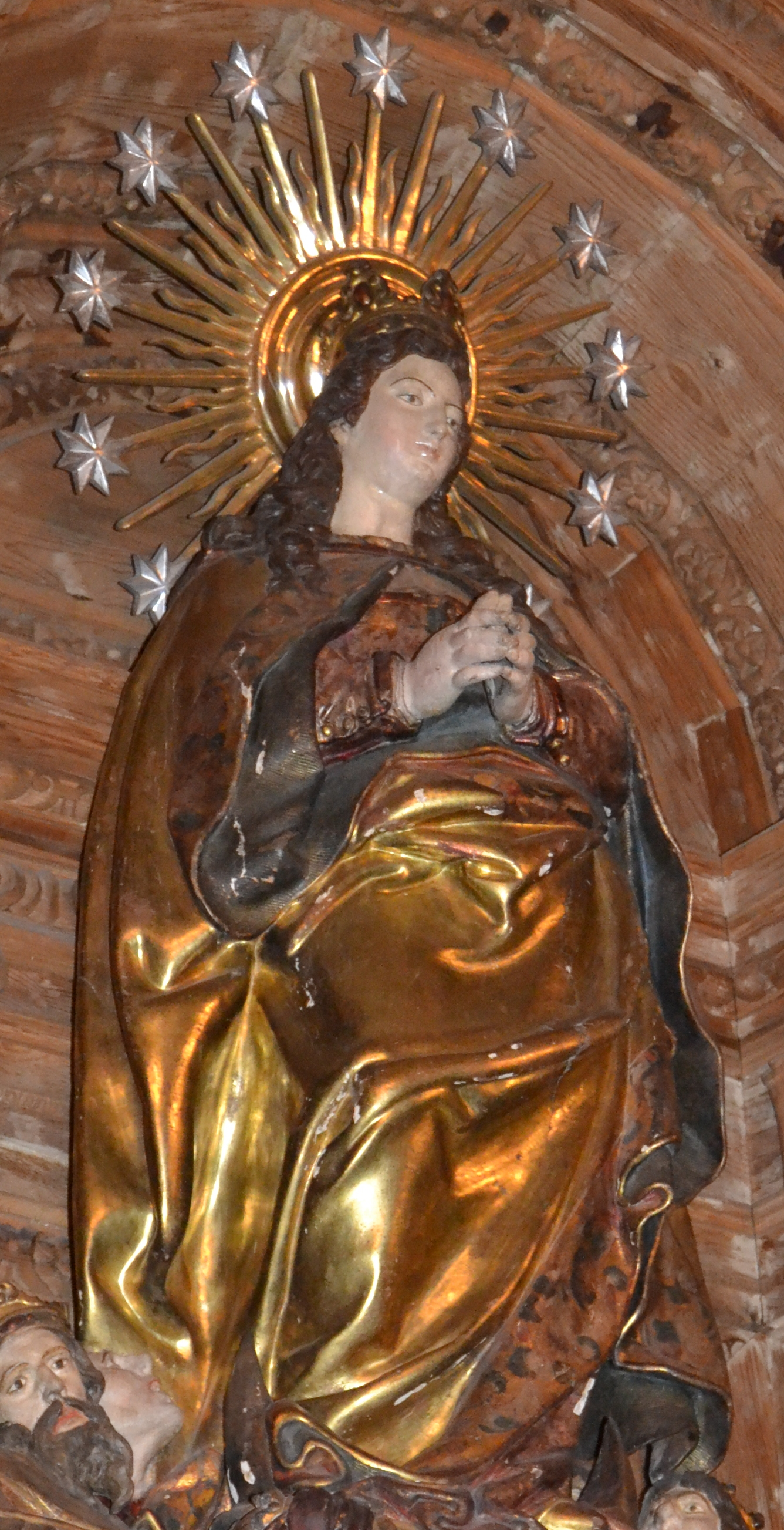 Imagen de la Purísima Concepción del retablo de la Purísima de Santa María de Verdú.